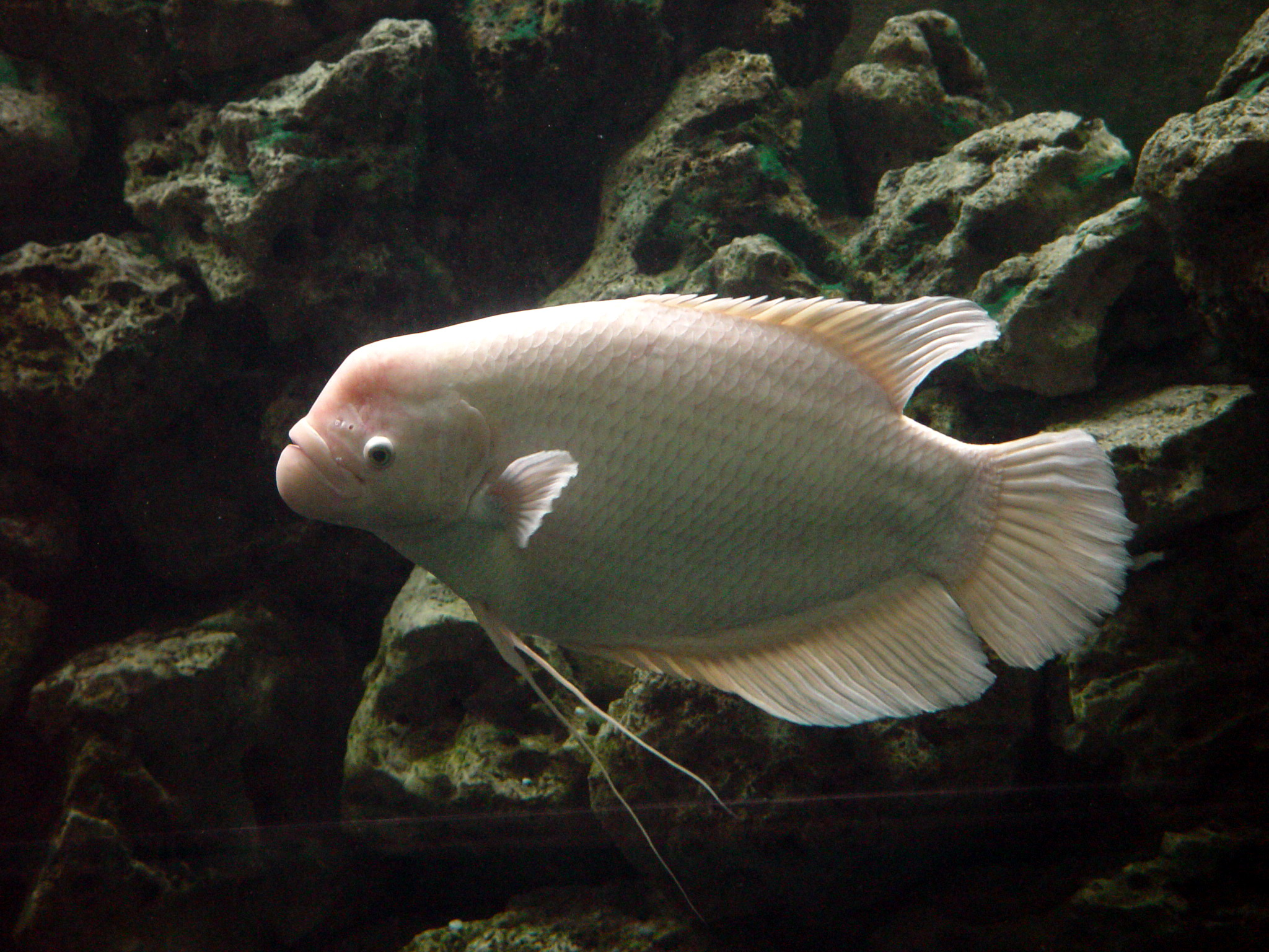 Bogazici Zoo